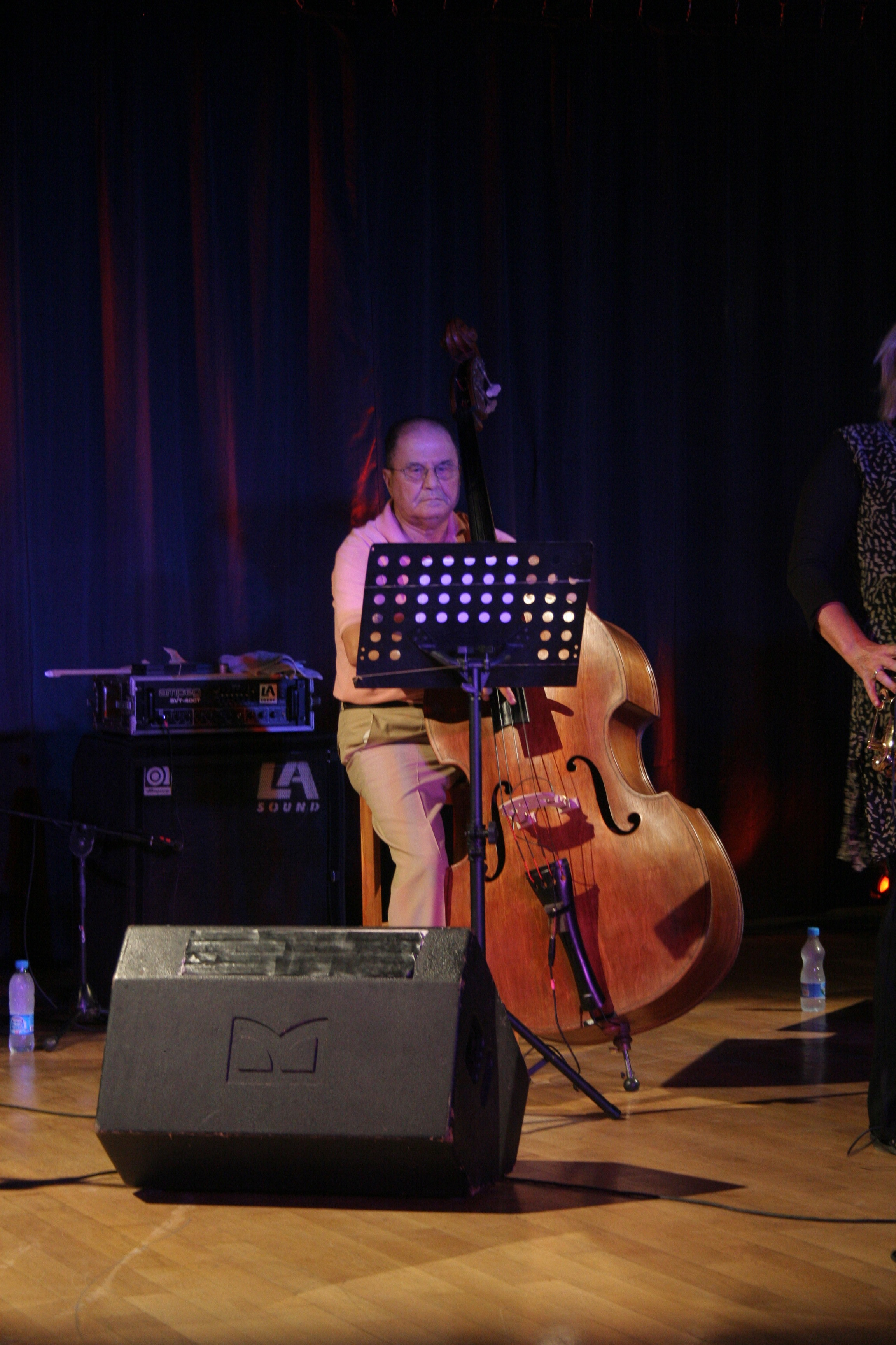 Caz müzisyeni